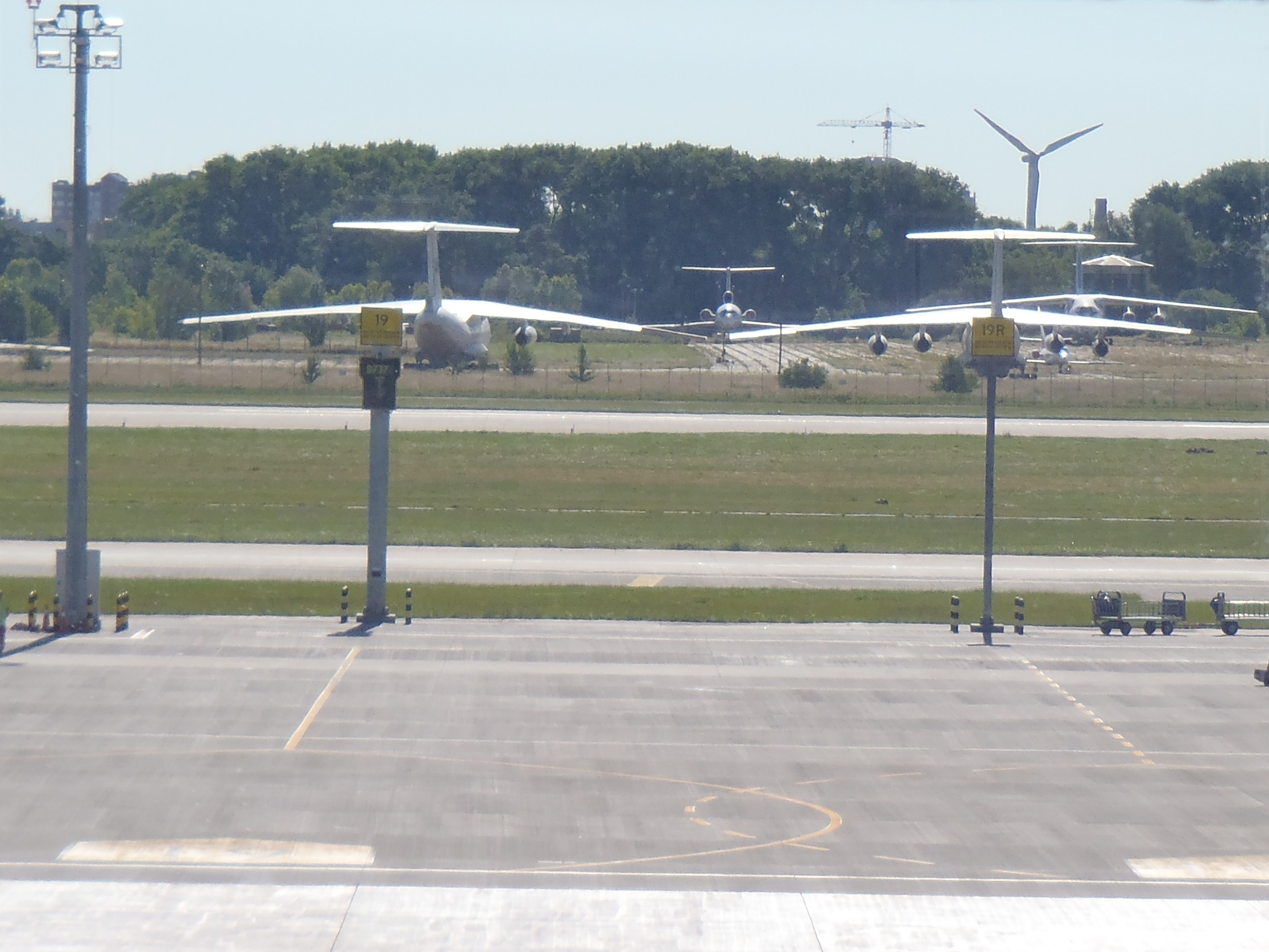 Сигнальная разметка полосы аэродрома